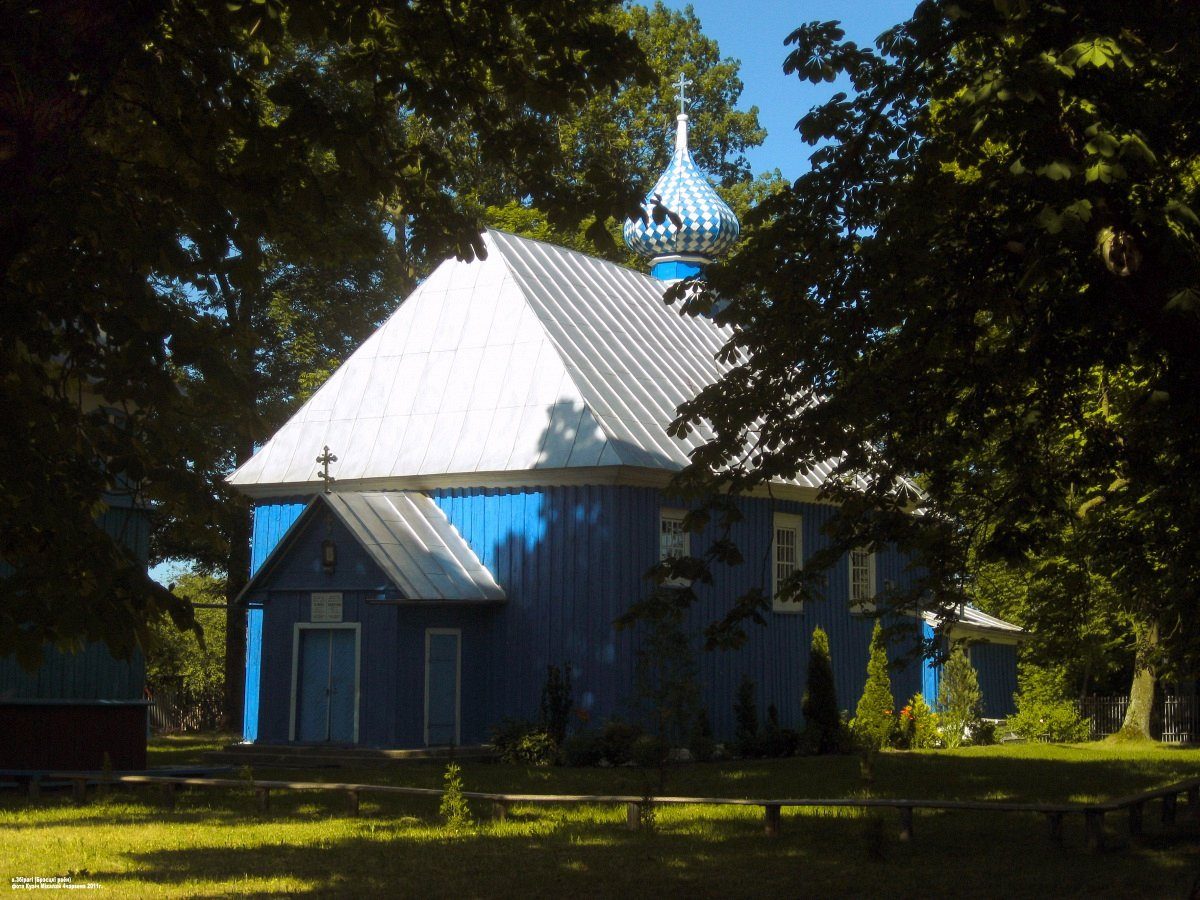 Збірагі. Свята-Параскева-Пятніцкая царква